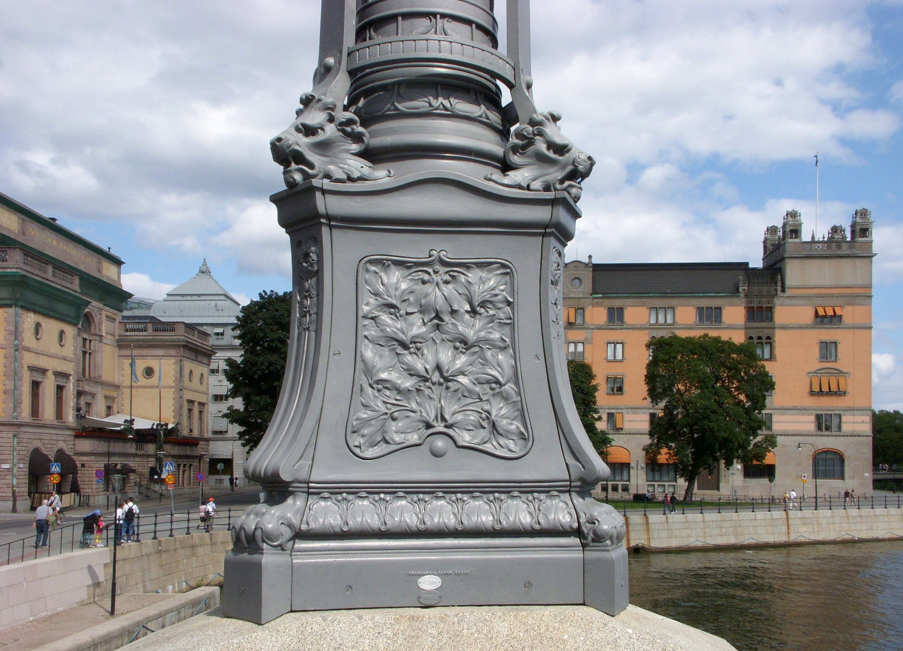 Vasabron i Stockholm, lyktfäste